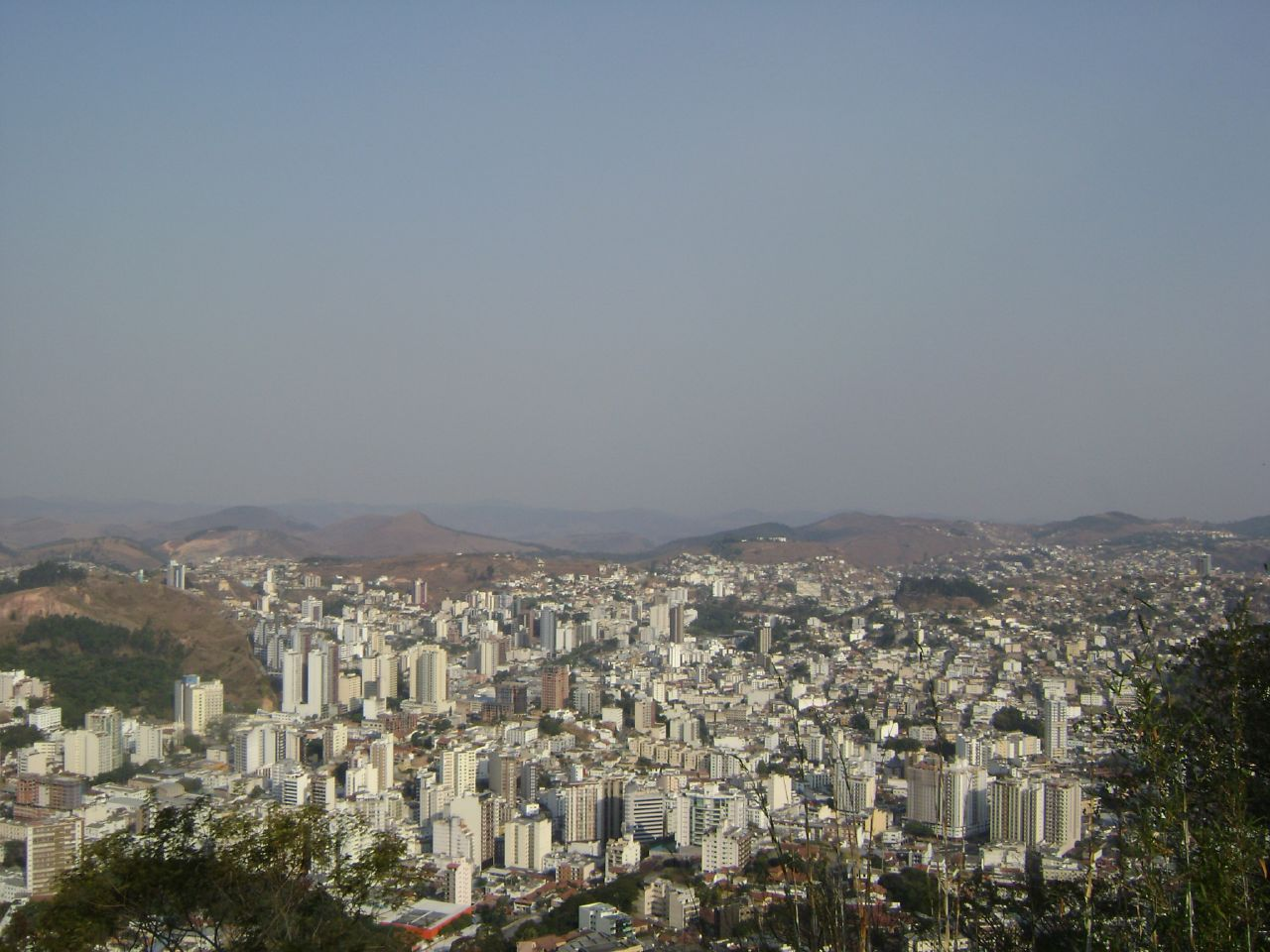 Vista panorâmica da cidade de Juiz de Fora, abril de 2007.